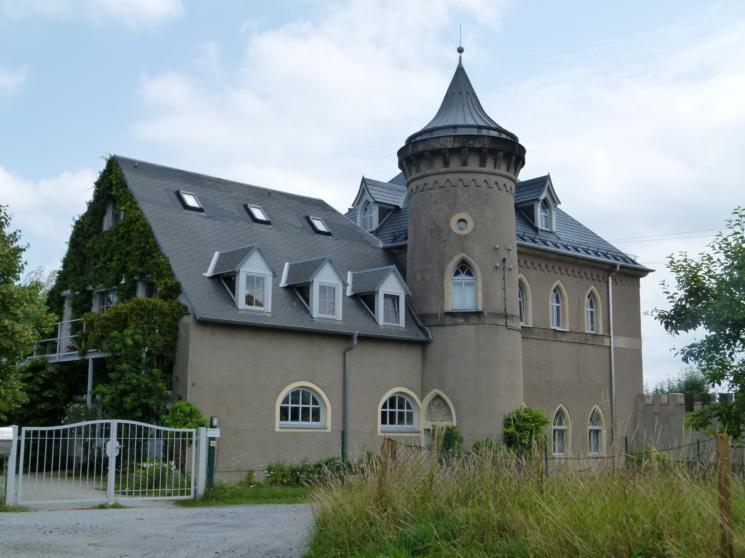 Herrenhaus / Turmhaus des denkmalgeschützten Rittergutes Rossendorf, Dresden, Sachsen